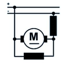 Esquema de un motor de CC de excitación compuesta